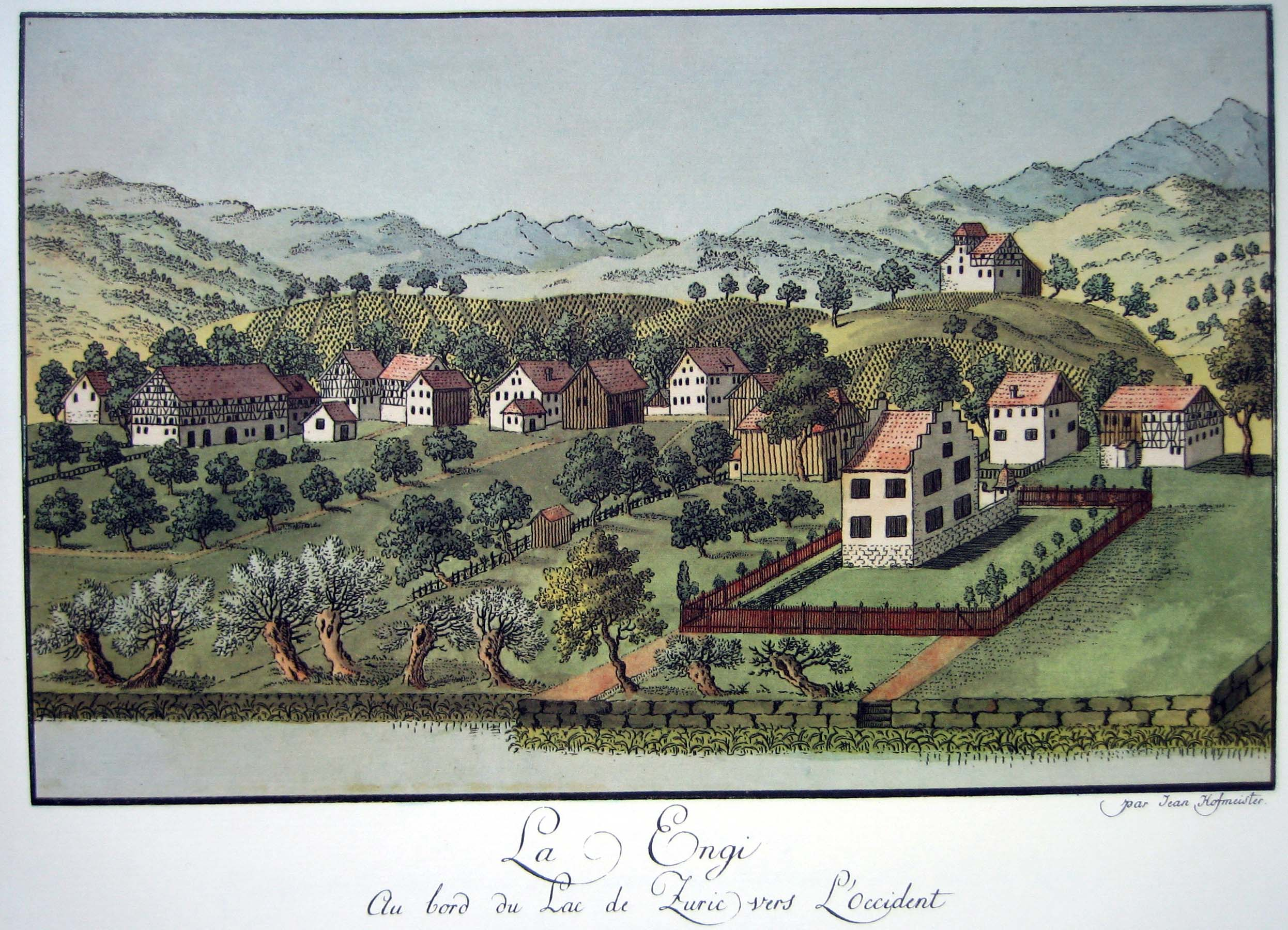 Zürich-Enge um 1794. Kolorierte Umrissradierung 16 x 26,5 cm. Orginalbeschriftung: "La Engi au bord du Lac de Zuric vers l'occident dessine d'apres la Nature"